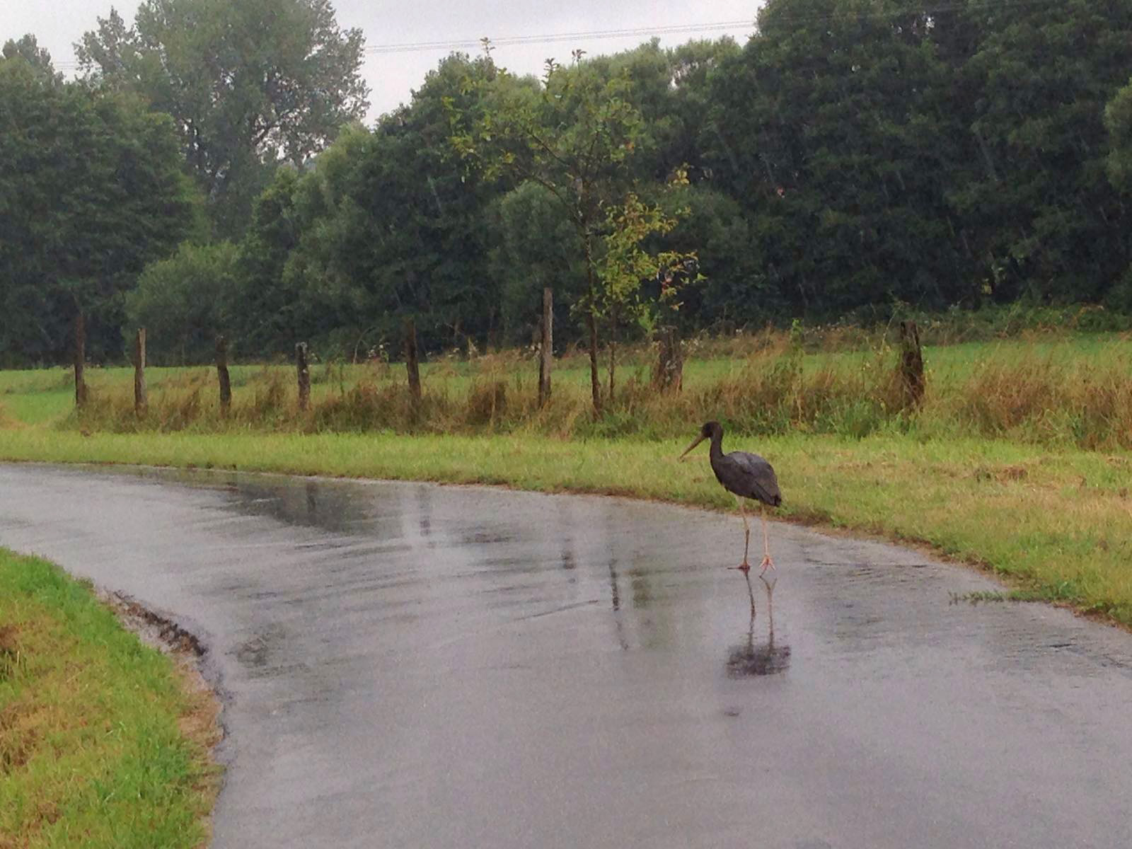 Schwarzstorch auf der Dorfstrasse zwischen Ersfeld und Rettersen im Westerwald